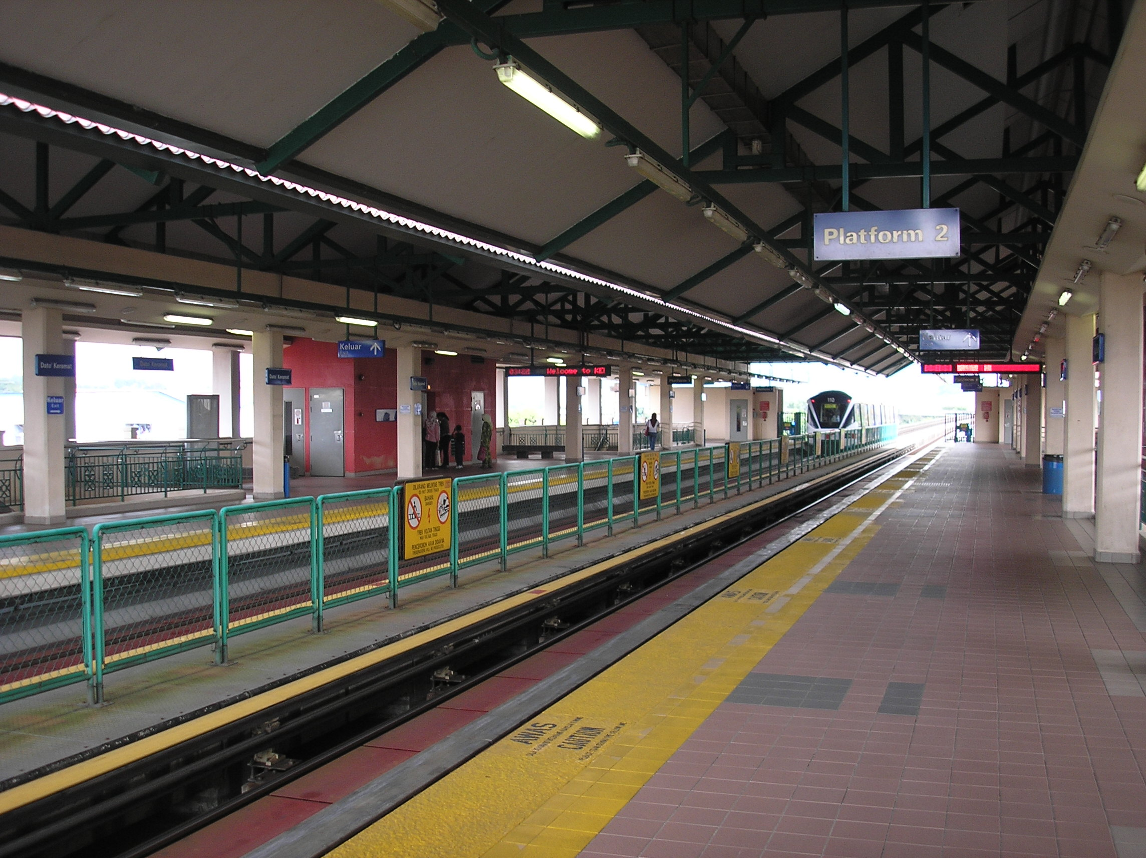 The Dato' Keramat LRT station (Kelana Jaya Line), Kuala Lumpur, Malaysia.